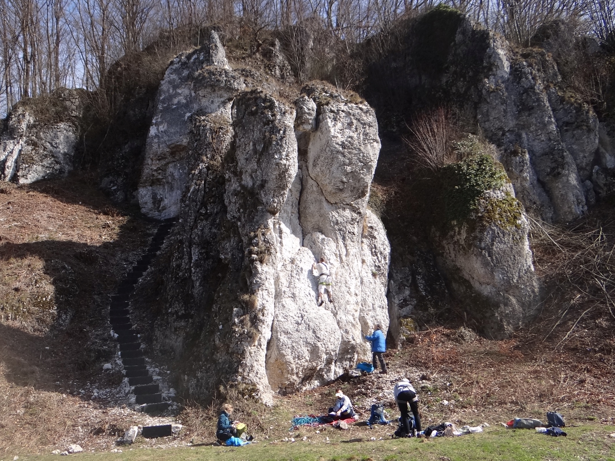 Skała Bramka w grupie Skał nad Boiskiem w Dubiu